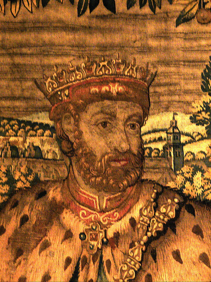 Christoffer II af Danmark, detalje fra vægtapet på Kronborg Slot, Sjælland